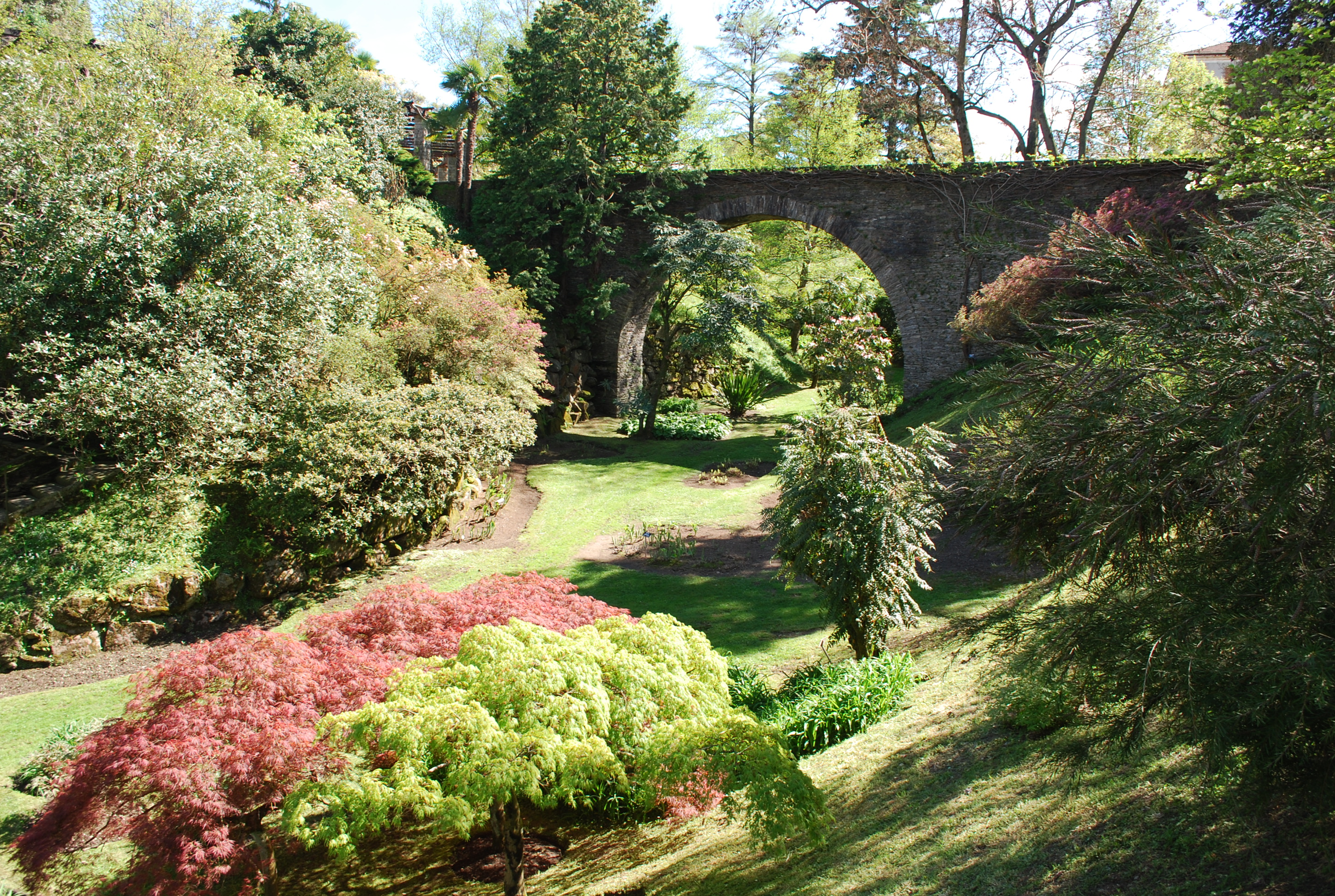 Giardini botanici di Villa Taranto, Verbania - La valletta con il ponte